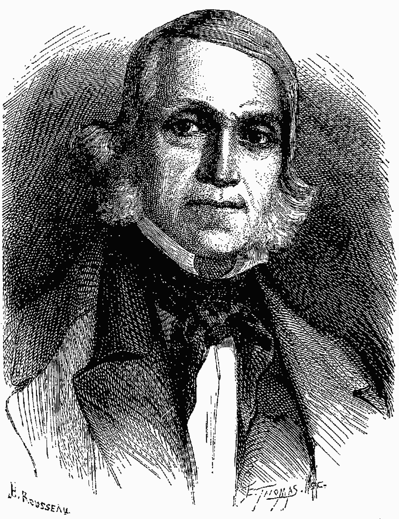 François Sudre